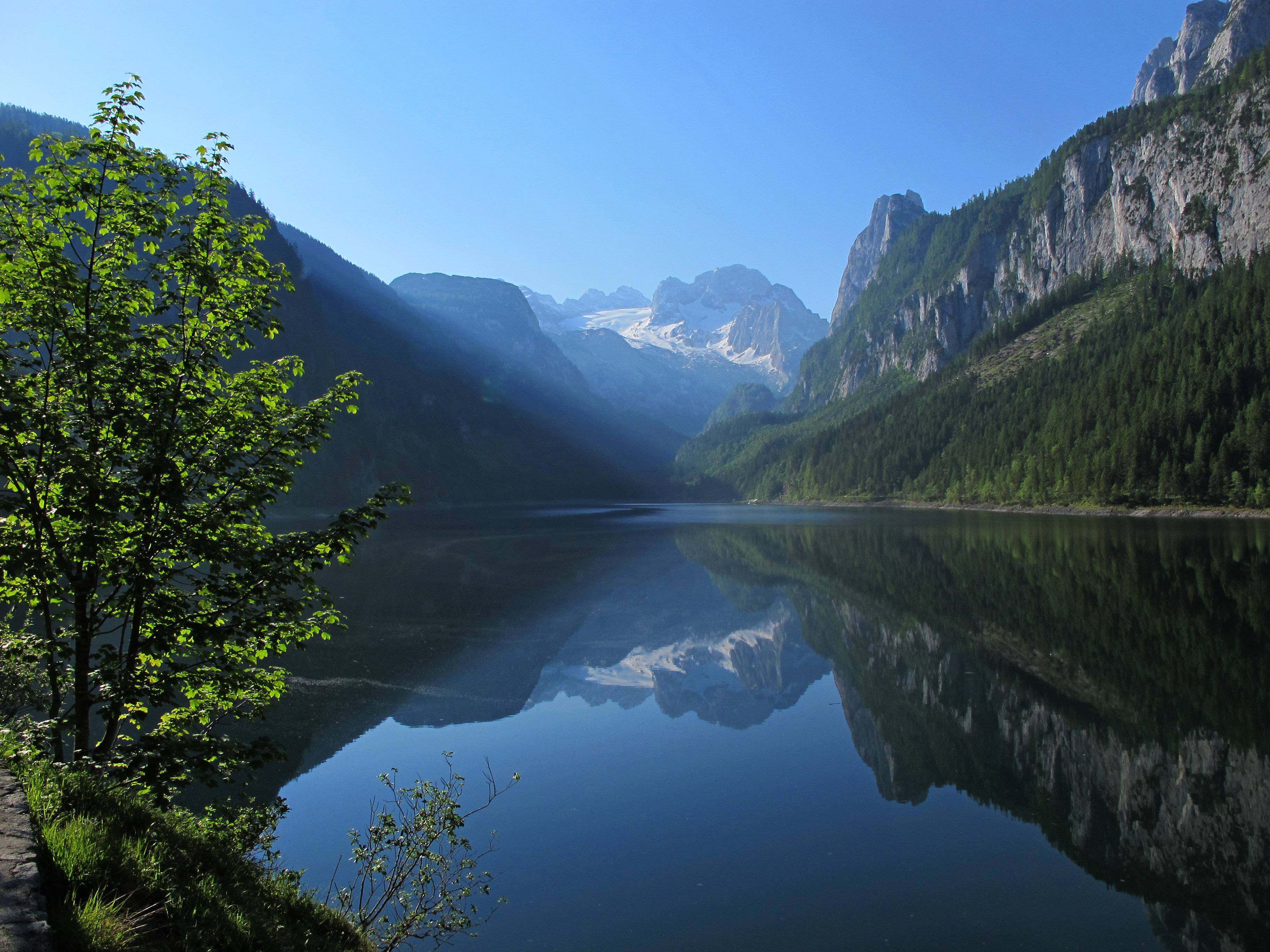 Blick vom Vorderen Gosausee in Richtung Dachstein